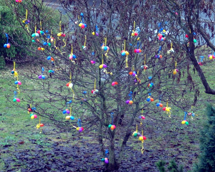 Påskeæg. Thüringen, Tyskland. 2005